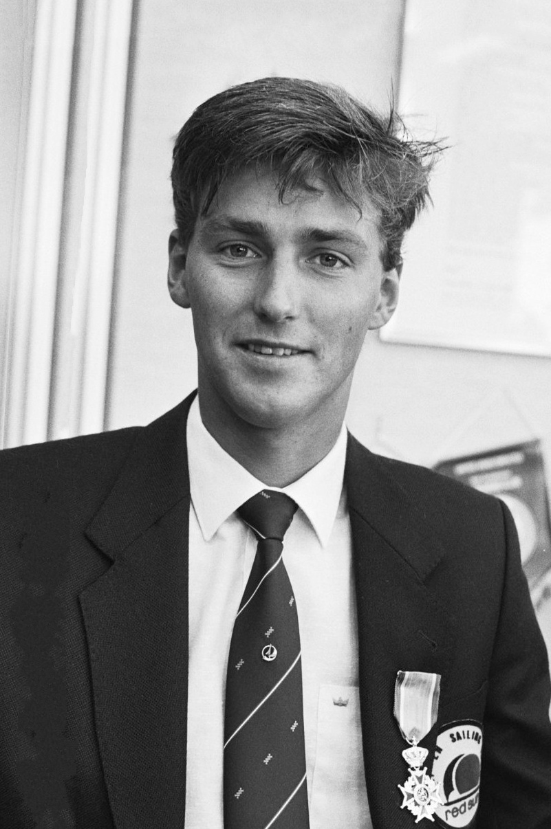 Stephan van den Berg